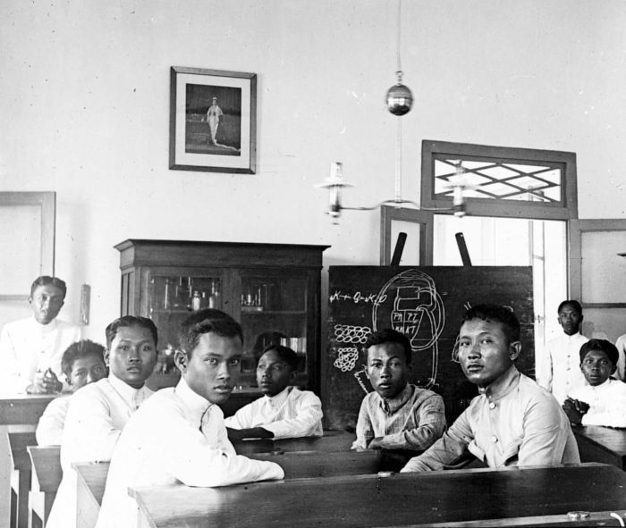 Repronegatief. Leerlingen van de school van de Landbouw Voorlichtings Dienst Midden Java te Tegalgondo